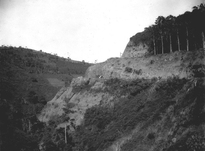 Foto. De weg langs de Cadas Pangeran in de omgeving van Soemedang